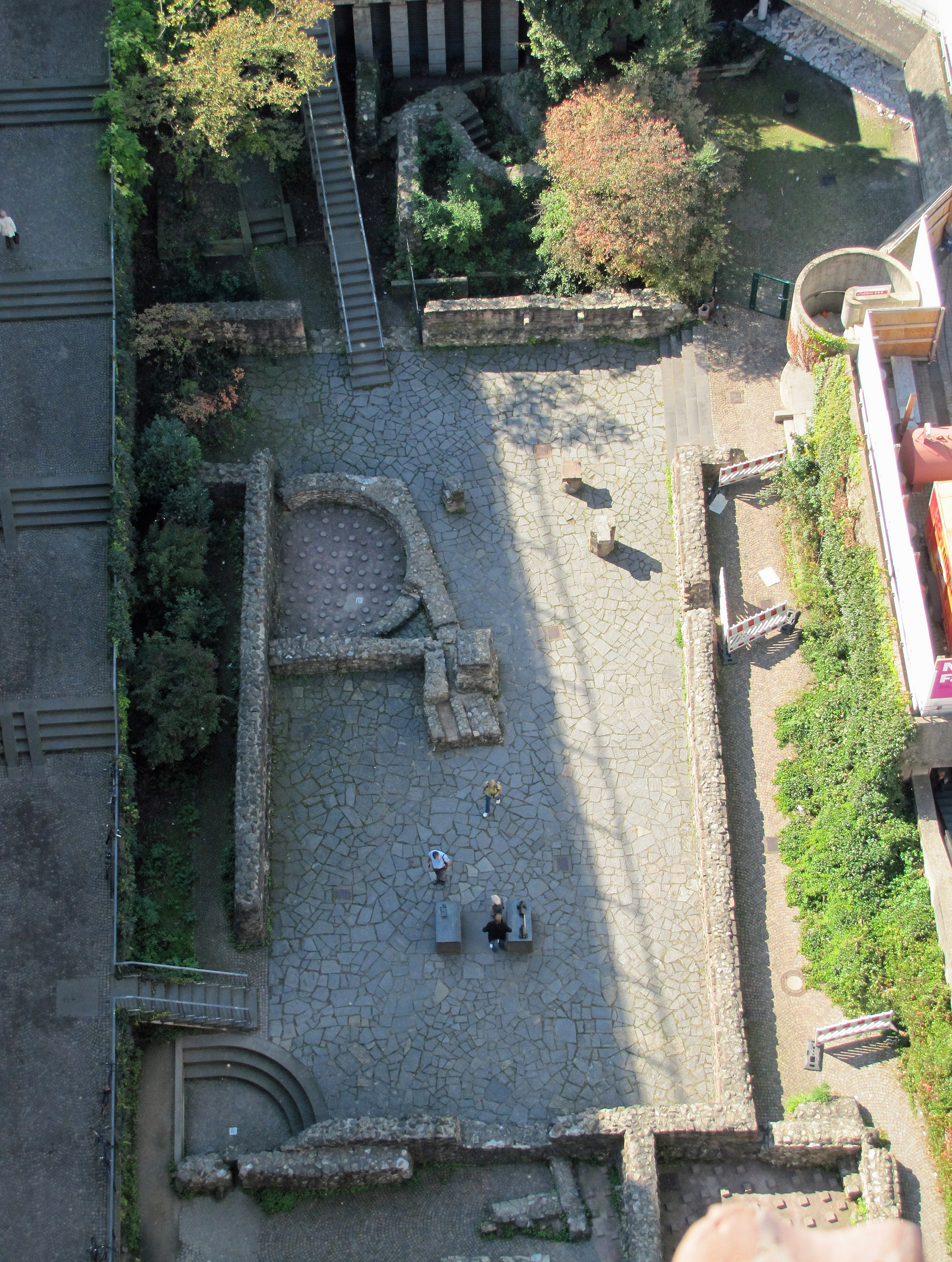 Reste der karolingischen Kaiserpfalz, auf dem Domhuegel in Ffm.